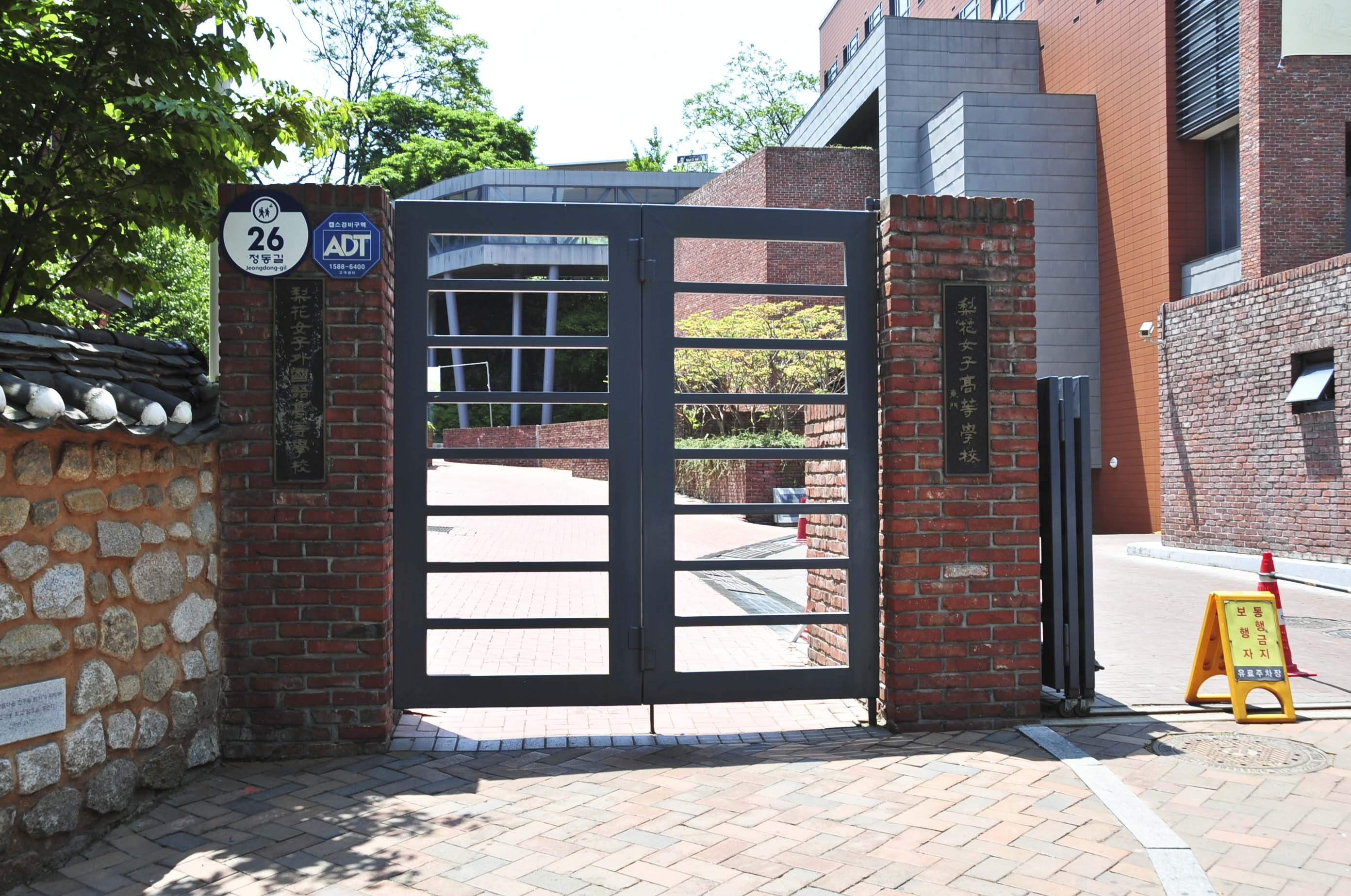 이화여자고등학교 정문, 서울특별시 중구 정동 32